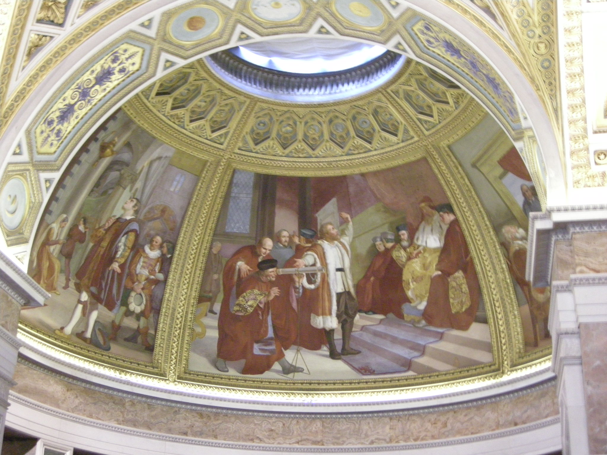 Tribuna di galileo, abside